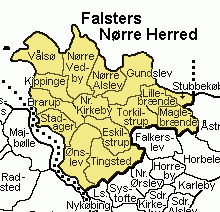 Falsters Nørre Herred Maribo Amt , Denmark.